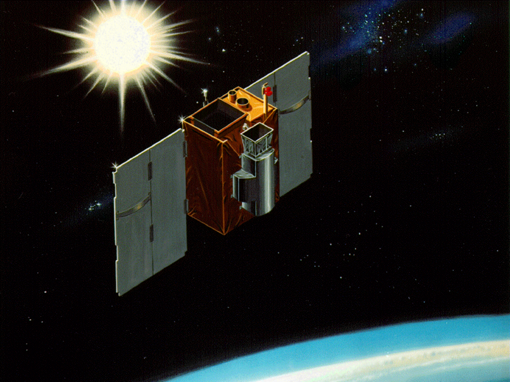 SAMPEX satellite